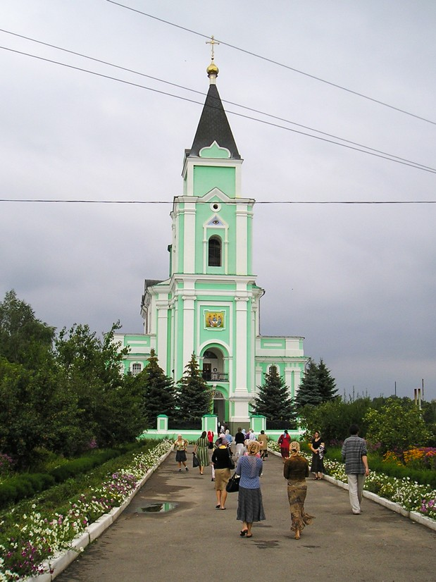 Троїцький монастир (мур.):, Браїлів,, вул. Леніна,1